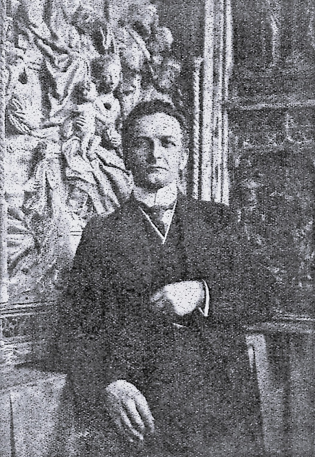 Direktor Dr. Karl Schaefer bei der Eröffnung des St.-Annen-Museums.